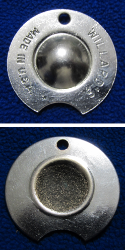 Queue Pomeranzenformer oder Aufrauer, Vorder- und Rückansicht